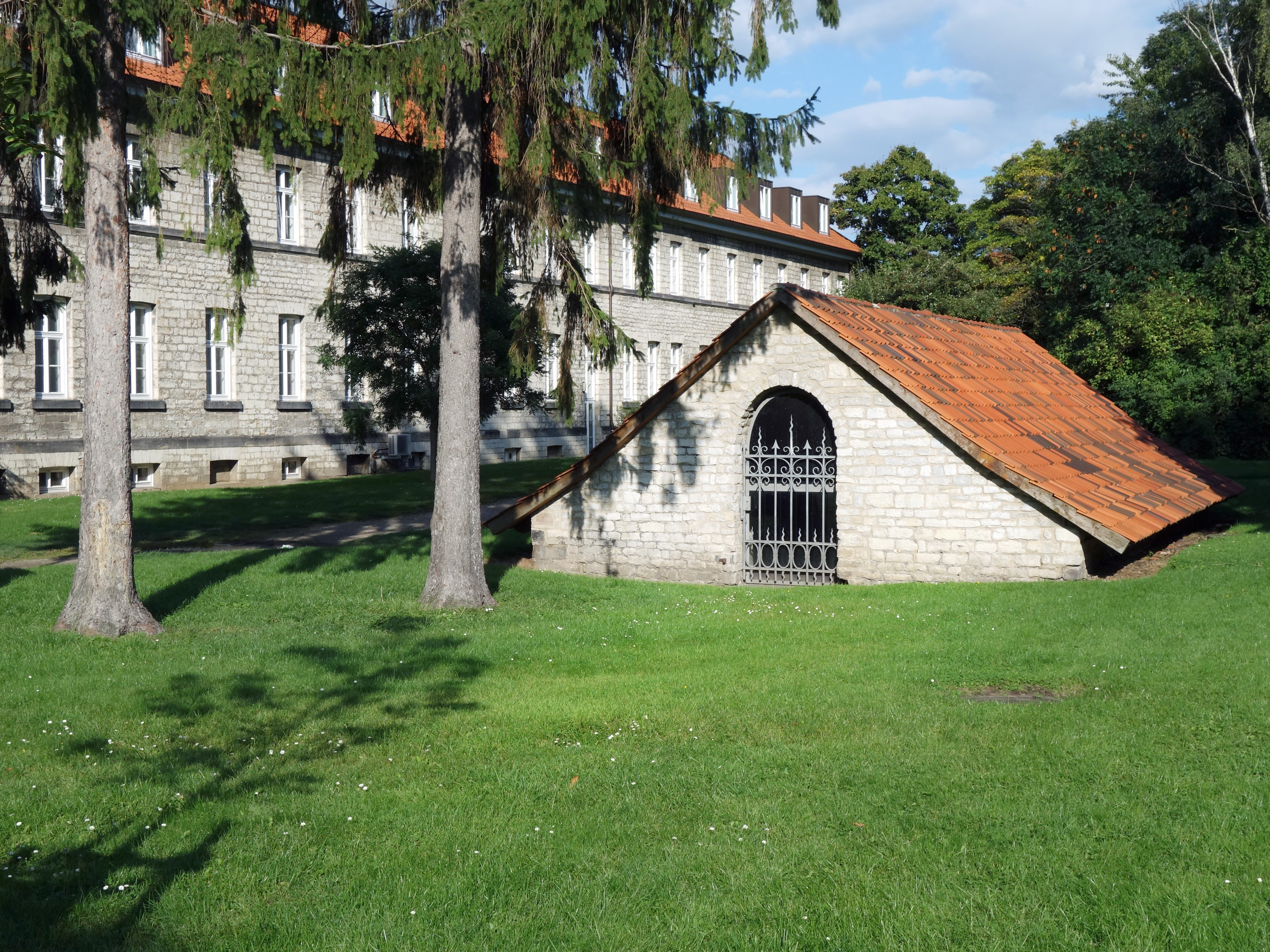 Gemauertes Quellhaus der Sültequelle in Hildesheim, um 1840